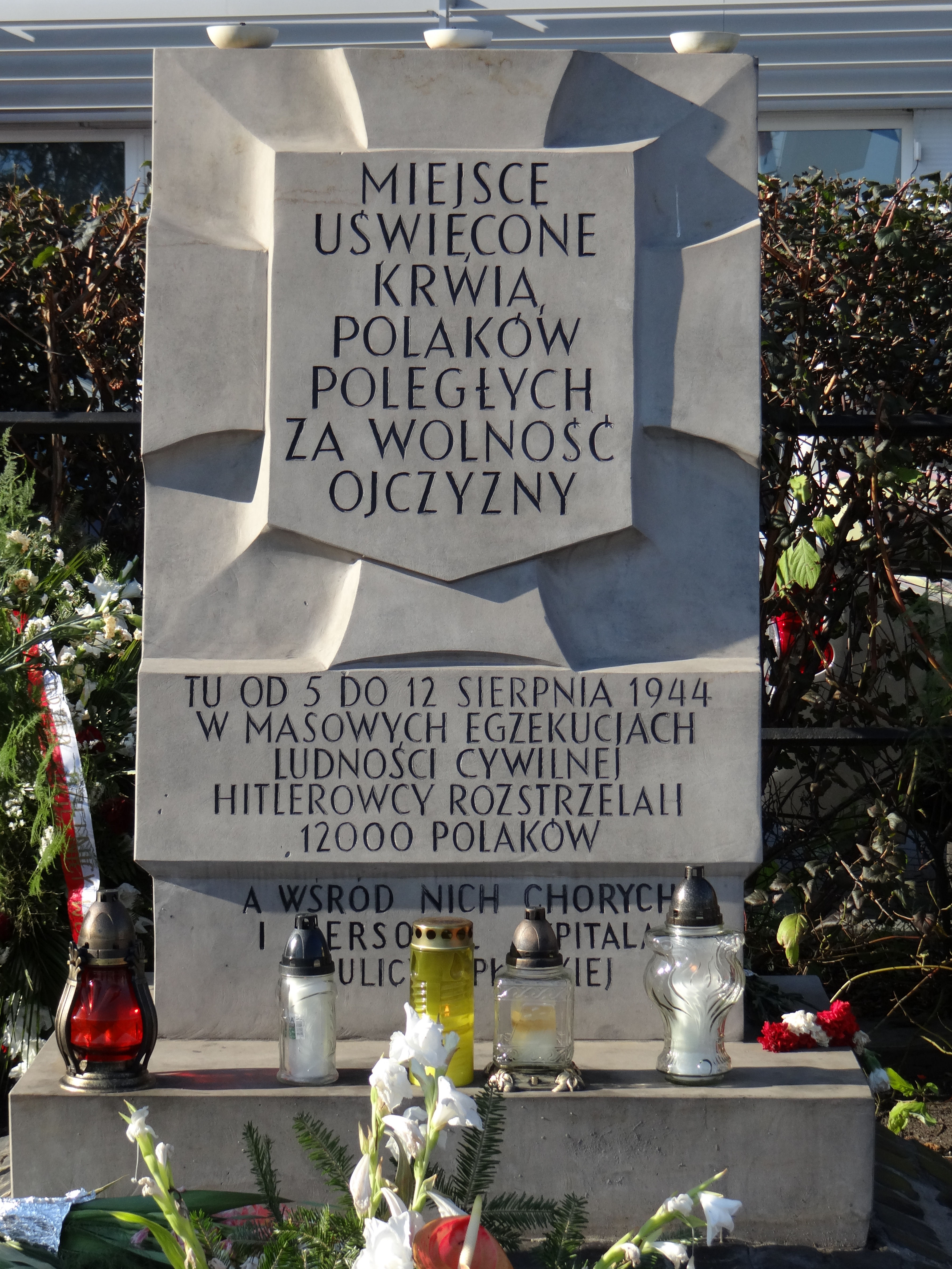 Pomnik masowego mordu dokonanego przez Niemieckich faszystów na 12 tysiącach niewinnych istnień Polskich, w tym pacjentach Szpitala Wolskiego w okresie od 5 do 12 sierpnia 1944 roku.